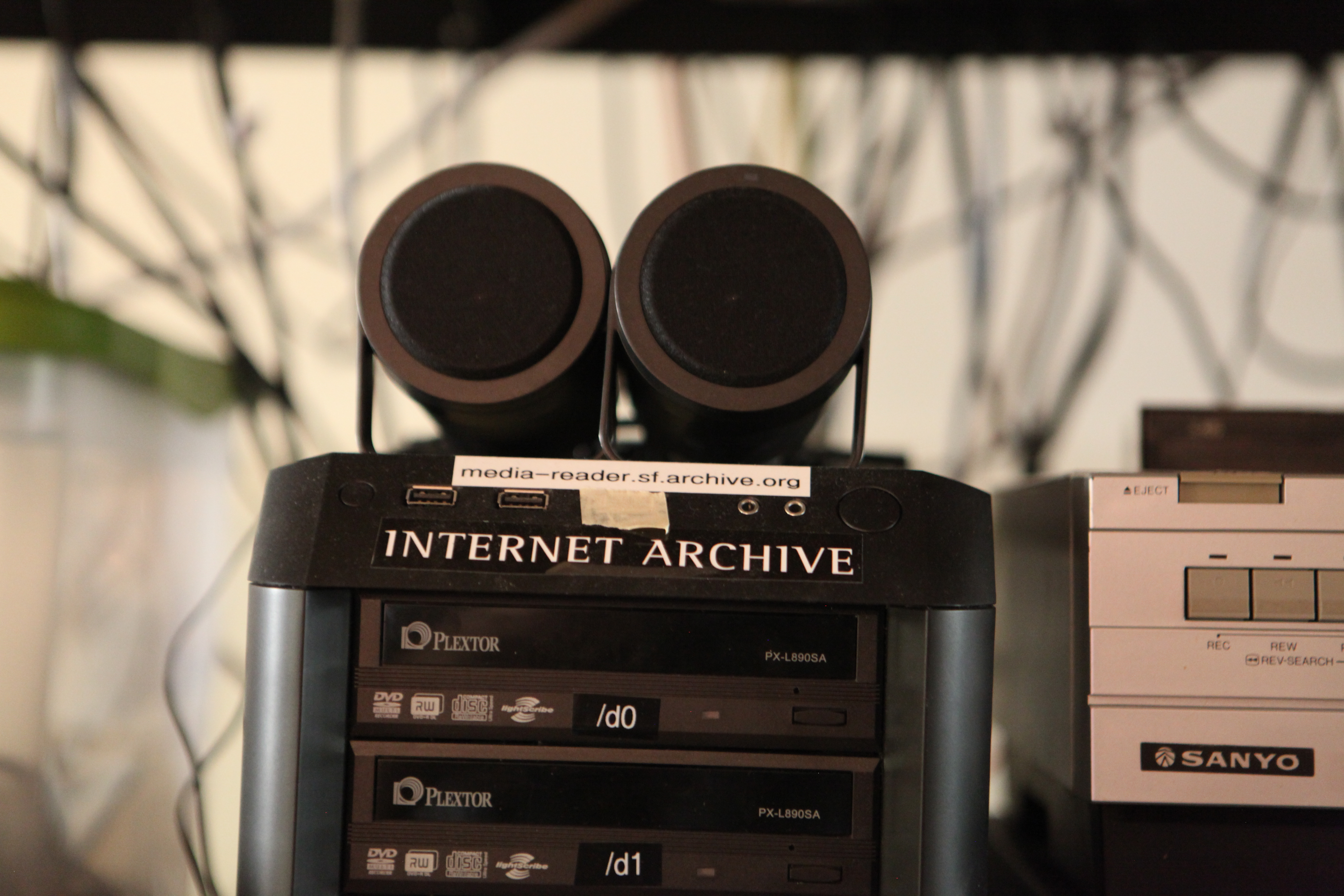 IMG_5020 Media reader